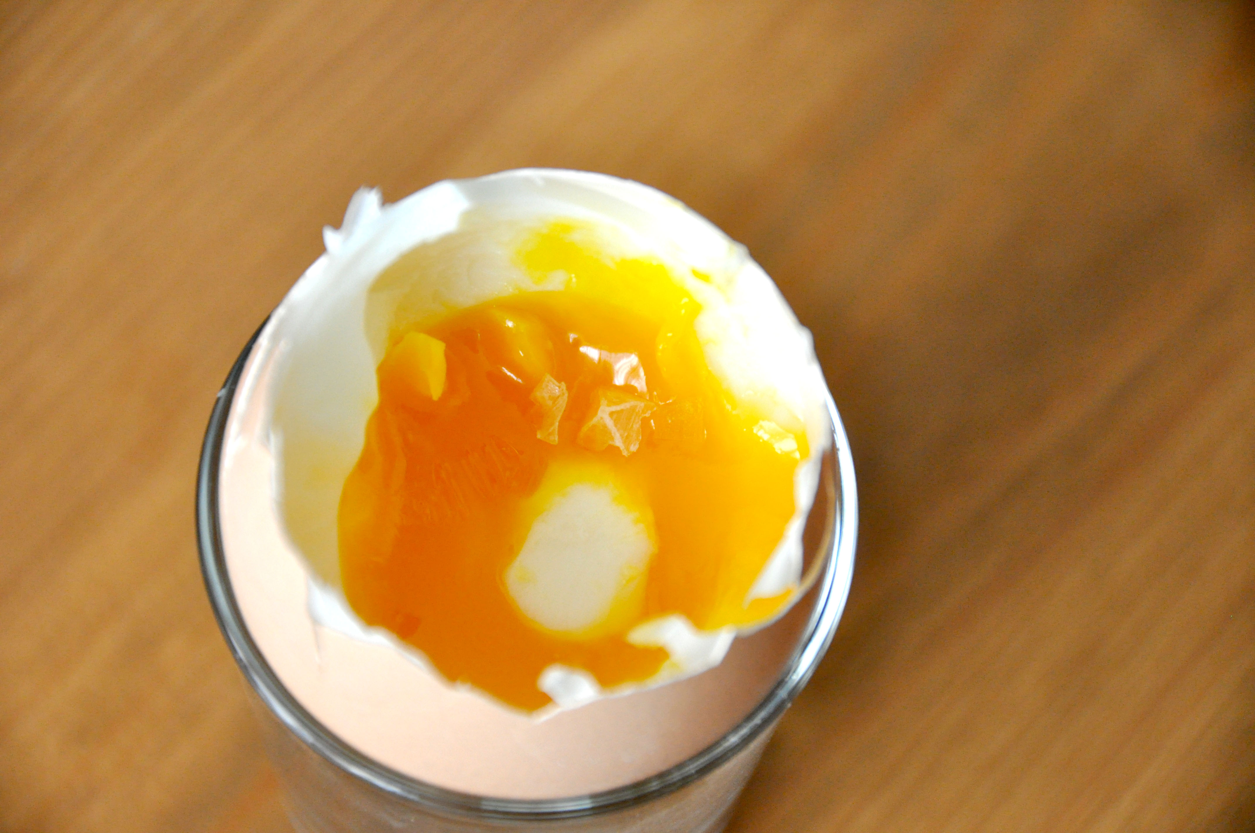 Blødkogt æg